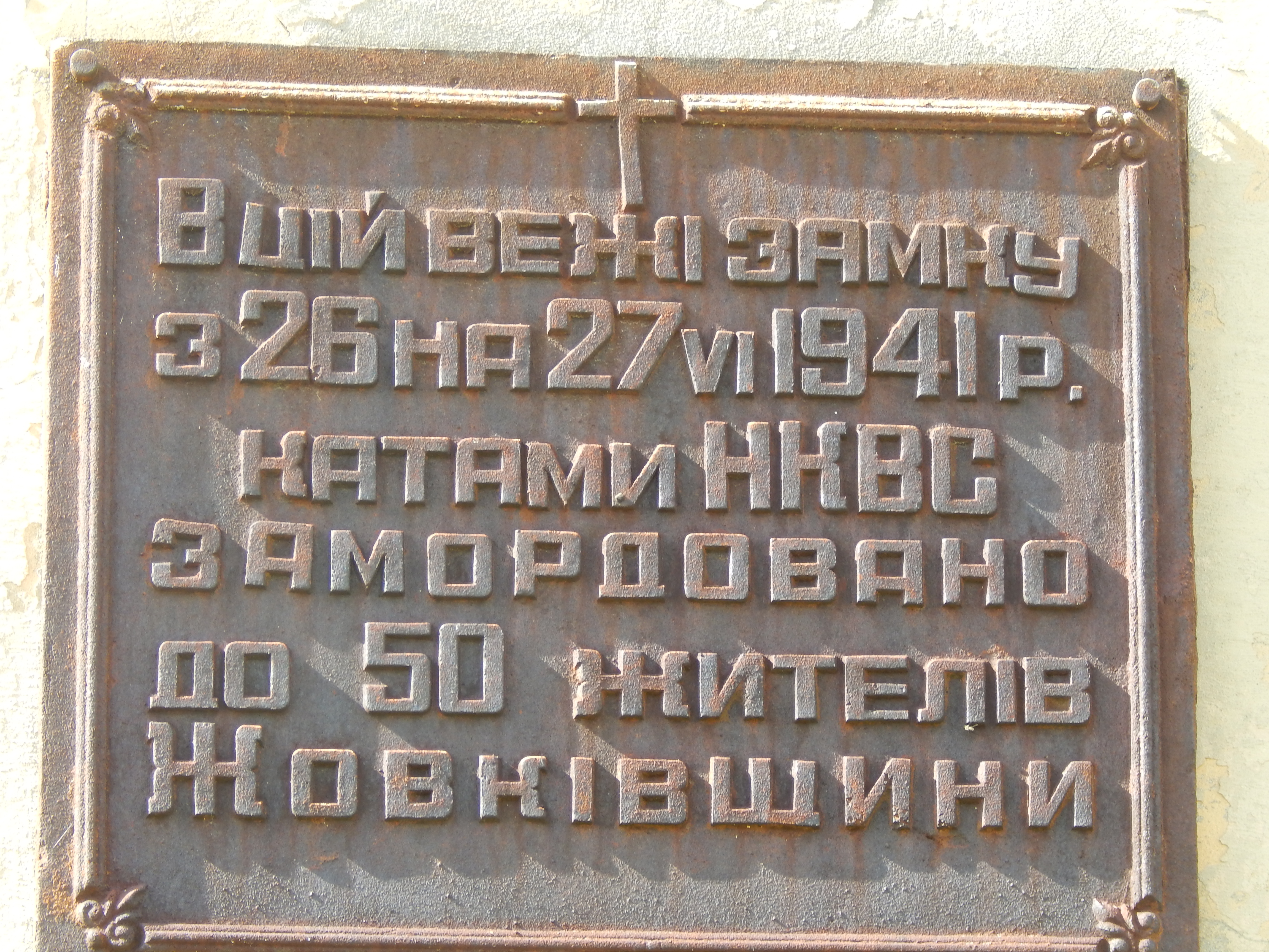 Замковий парк, Жовківський р-н м. Жовква